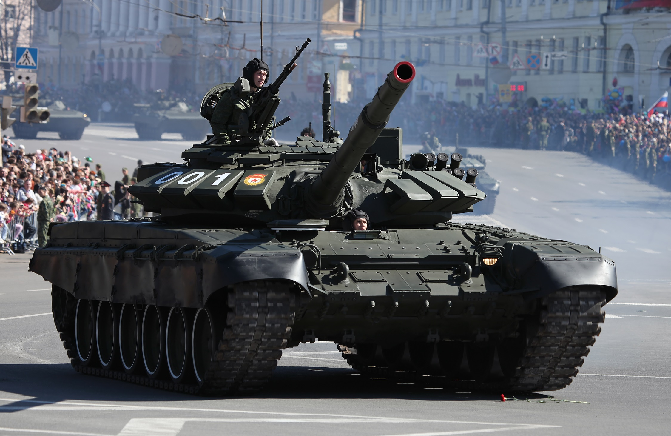 Т-72Б3 на параде Победы в Нижнем Новгороде 9 мая 2014 года.